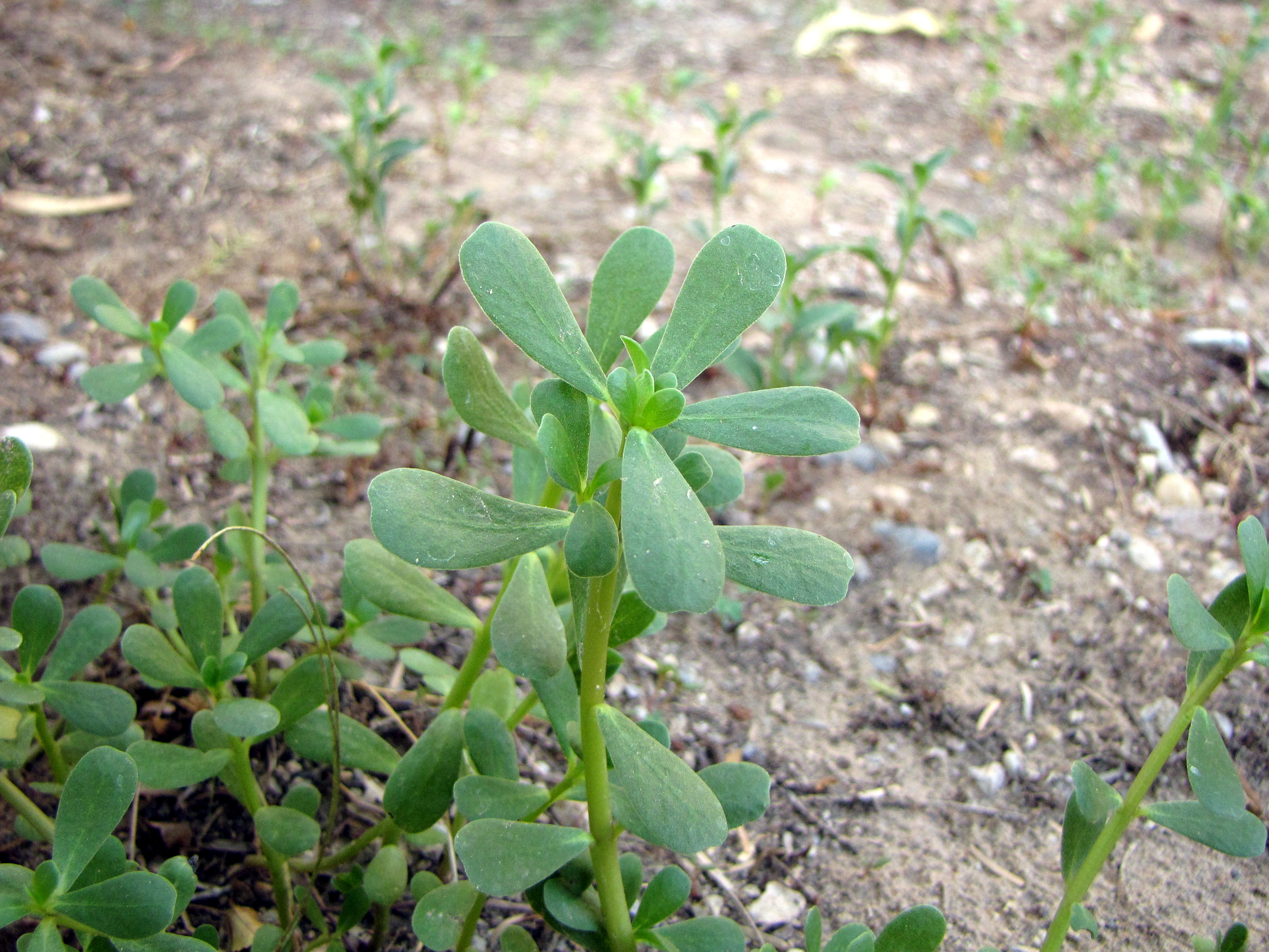 Portulaca oleracea